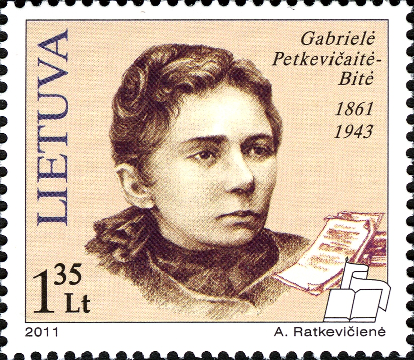 Famous People - Gabriele Petkevicaite-Bite (1861-1943)